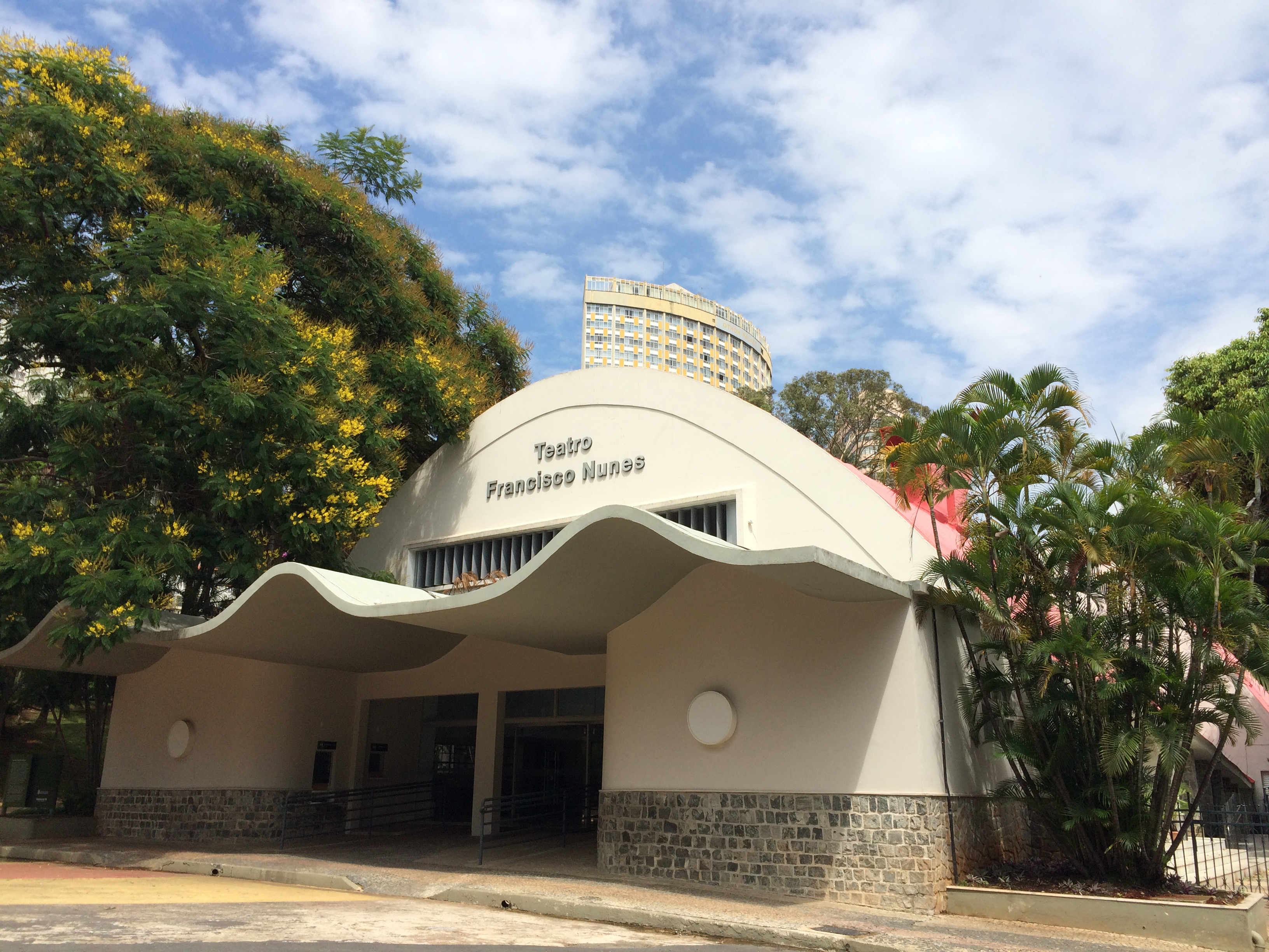 Parque Municipal de BH, Teatro Francisco Nunes - MG